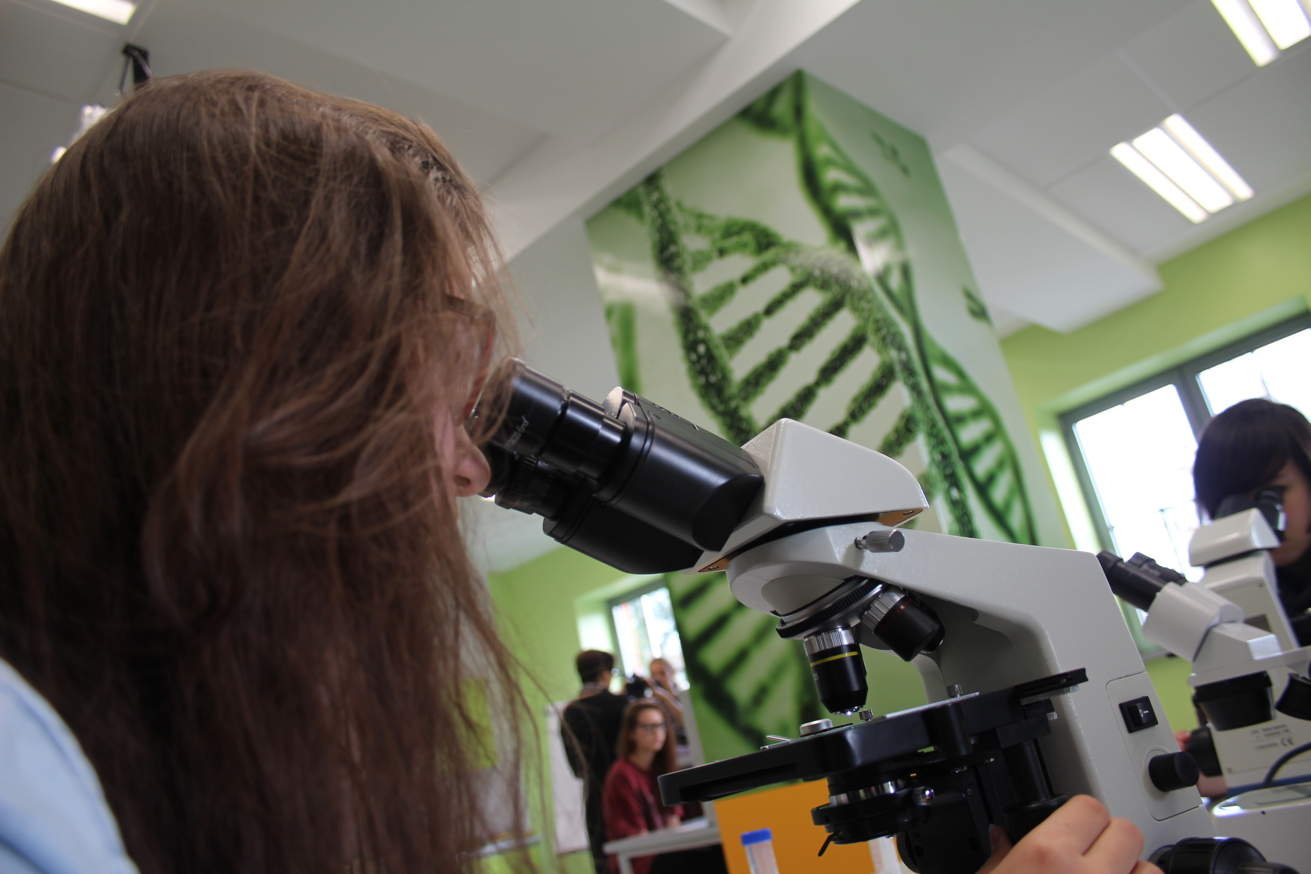 Pracownia biologiczna Centrum Nowoczesności Młyn Wiedzy jest wyposażona w nowoczesny sprzęt, który pozwala realizować specjalistyczne zajęcia dla uczniów szkół gimnazjalnych i ponadgimnazjalnych.